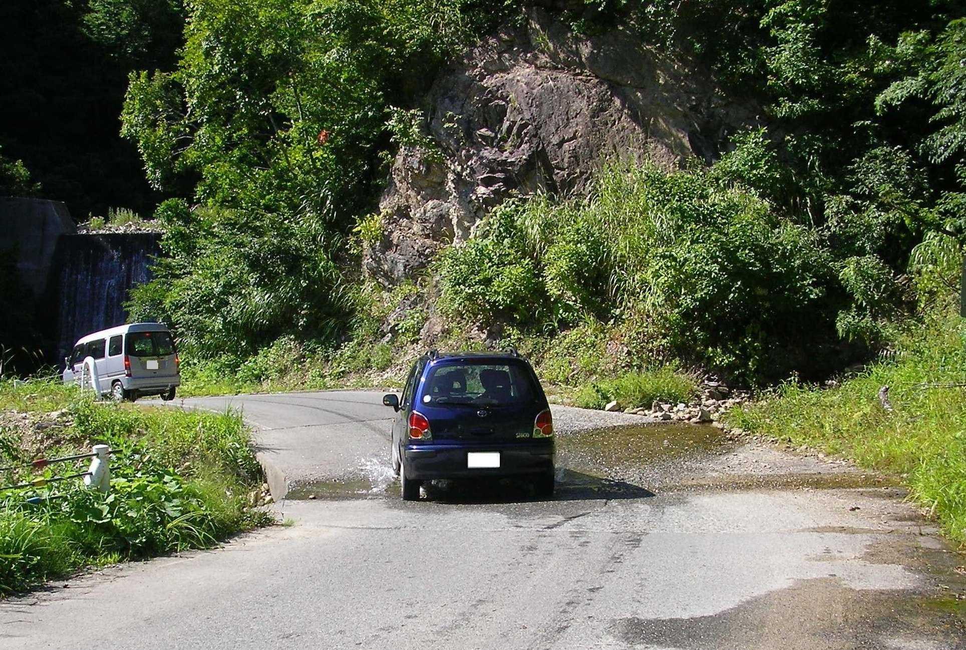 国道352号（新潟県魚沼市、奥只見湖岸）。洗い越しを渡って自動車が福島県方面へ向かう。2006年9月